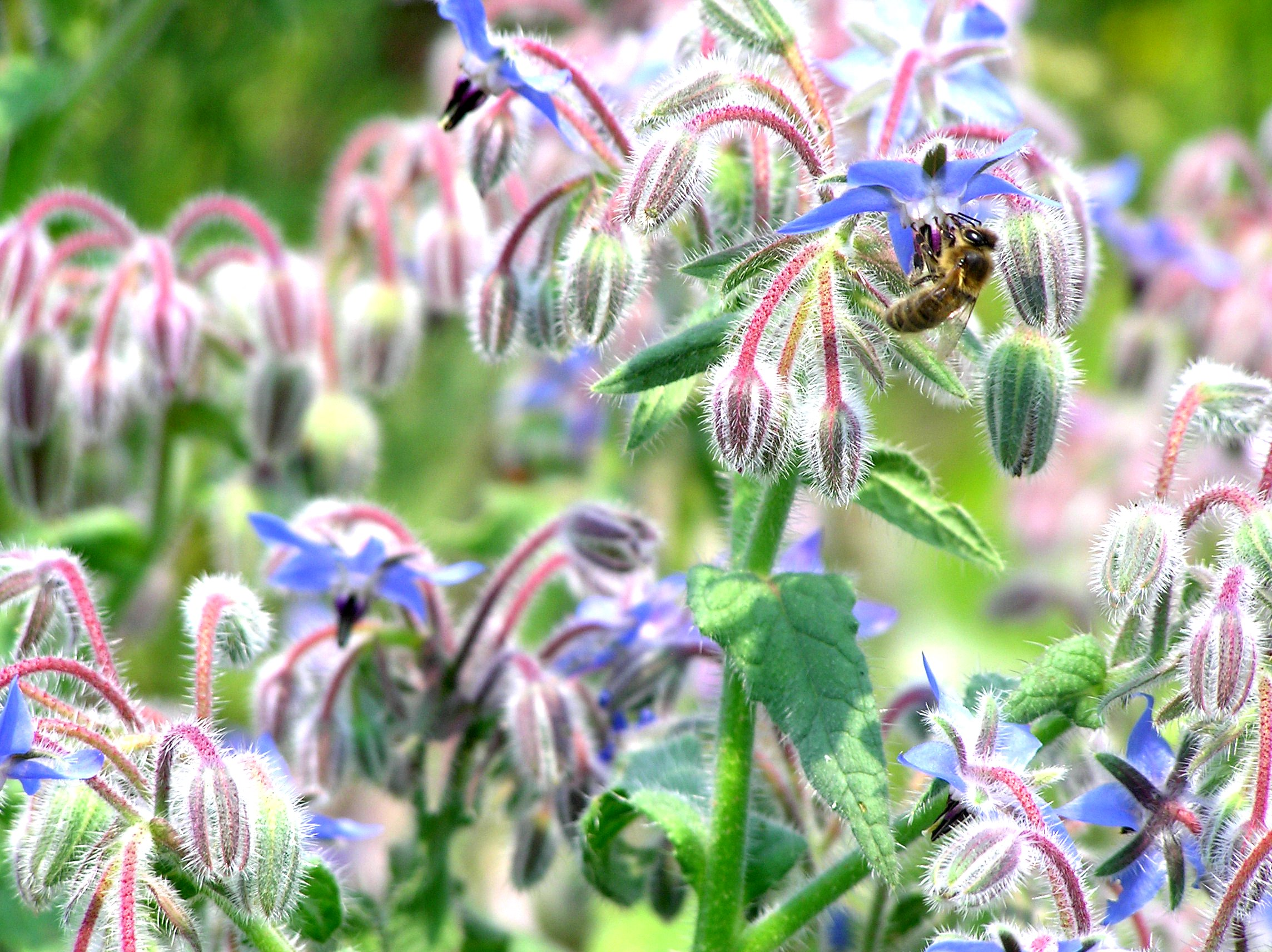 Ogórecznik lekarski Praca własna OLYMPUS DIGITAL CAMERA Data oryginału - 2005:07:09 12:42:05